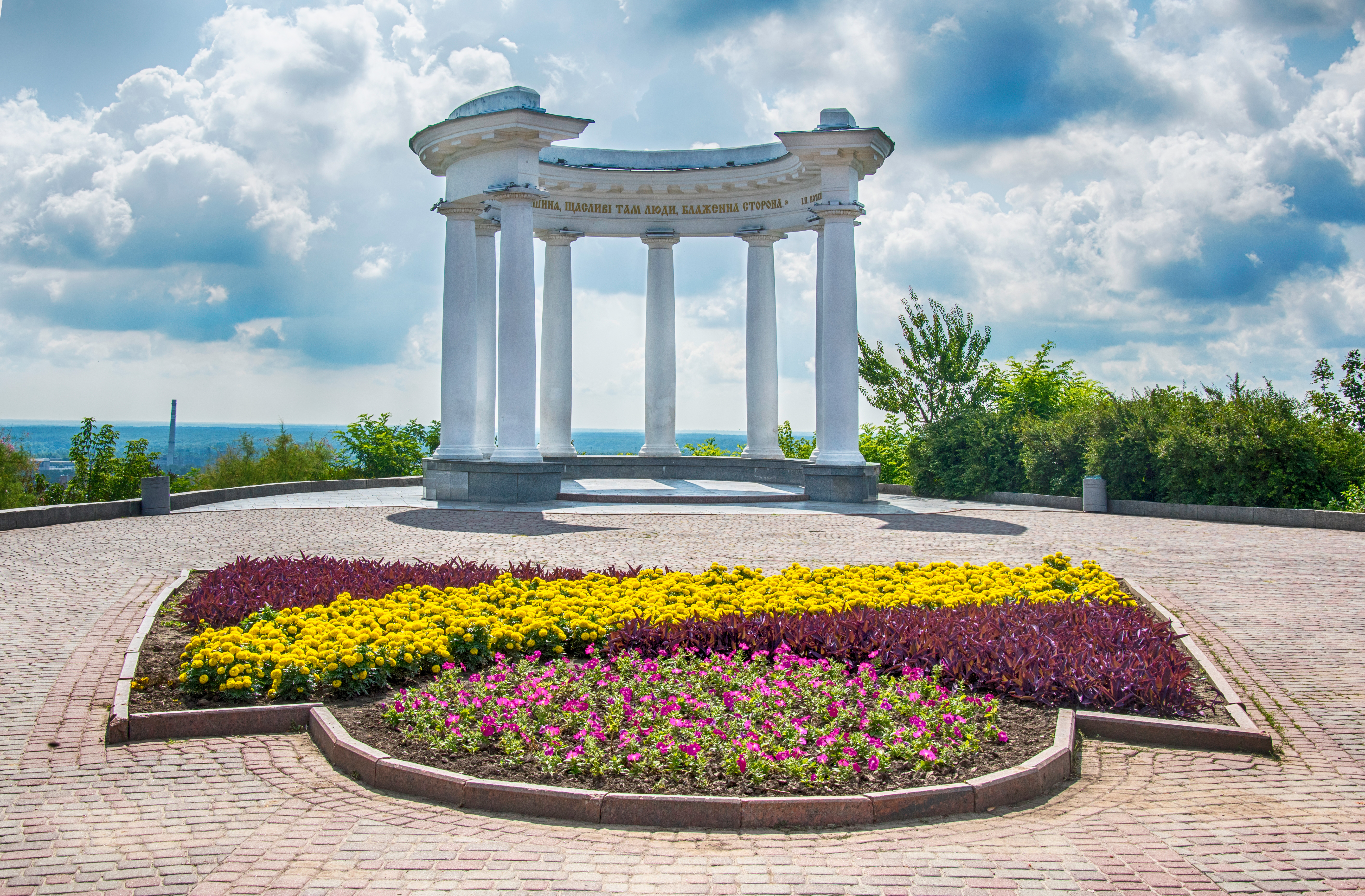 Ротонда дружби народів (Біла альтанка), Полтава, Соборний майдан